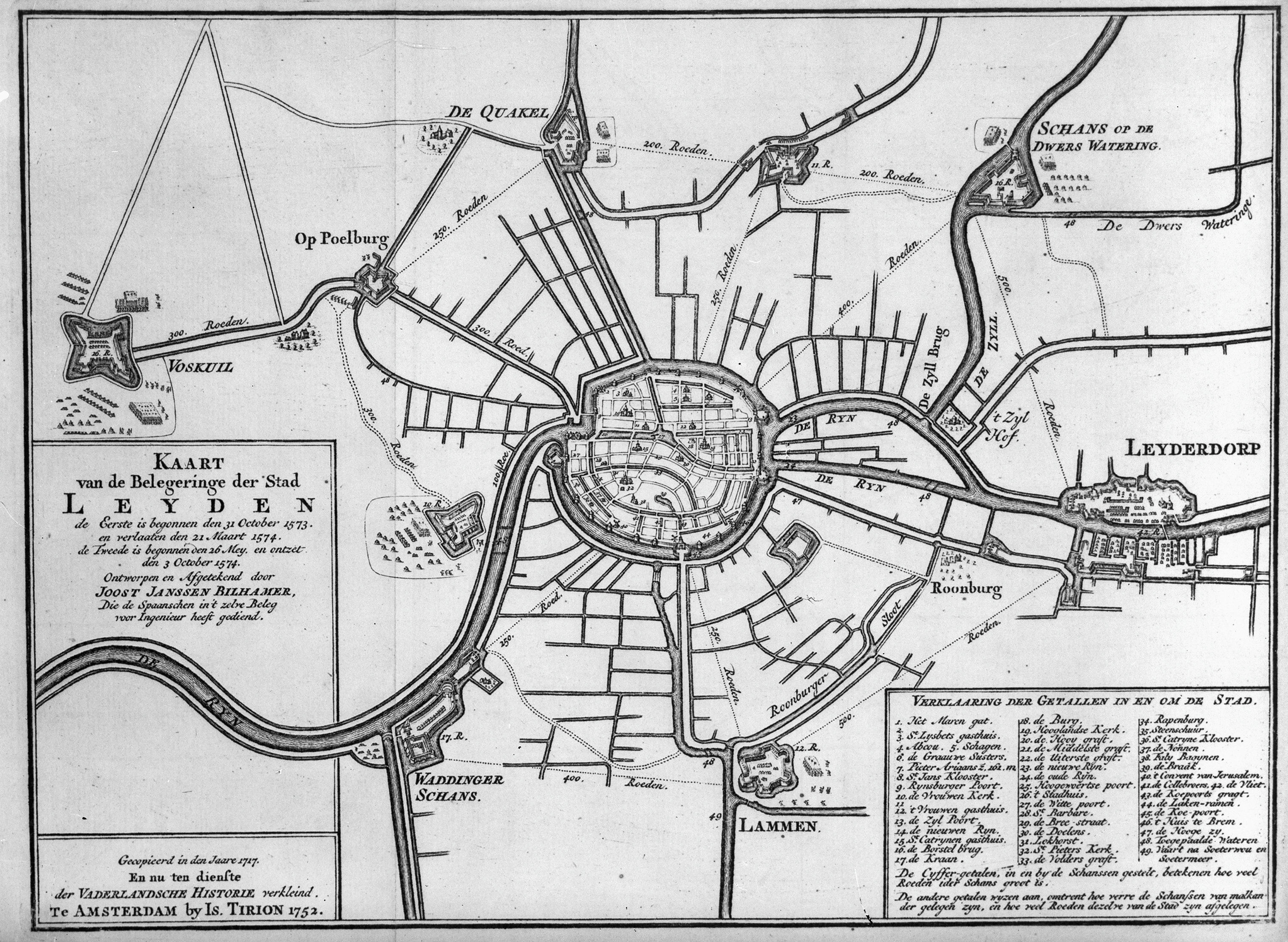 Kaart/ Plattegrond: Kaart van stad Leiden en omgeving: Kaart van de belegeringe der Stad Leyden, Is. Tirion 1752